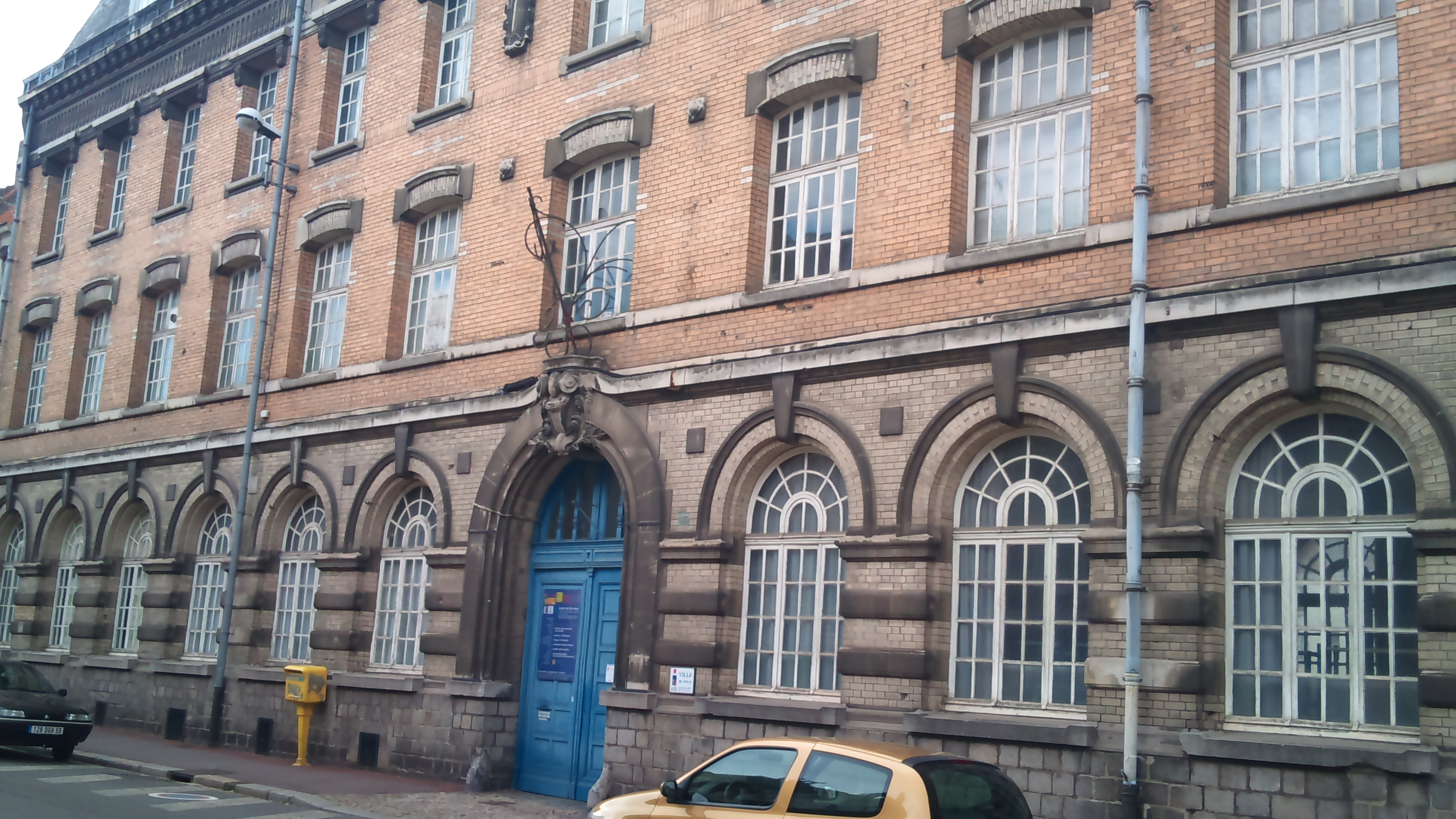 Douai - Rues Wetz - Ecole des Arts - Architecte Henri Sirot